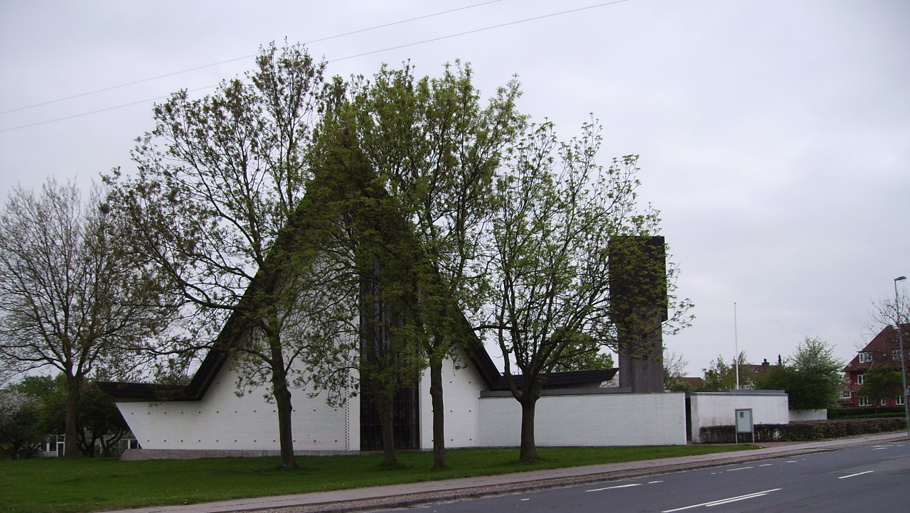 Munkebjerg Kirke, Munkebjerg Sogn, Odense Herred, Odense Amt, Denmark (Danish Church) Date: 17.05.2006 Photographed by Søren Møller